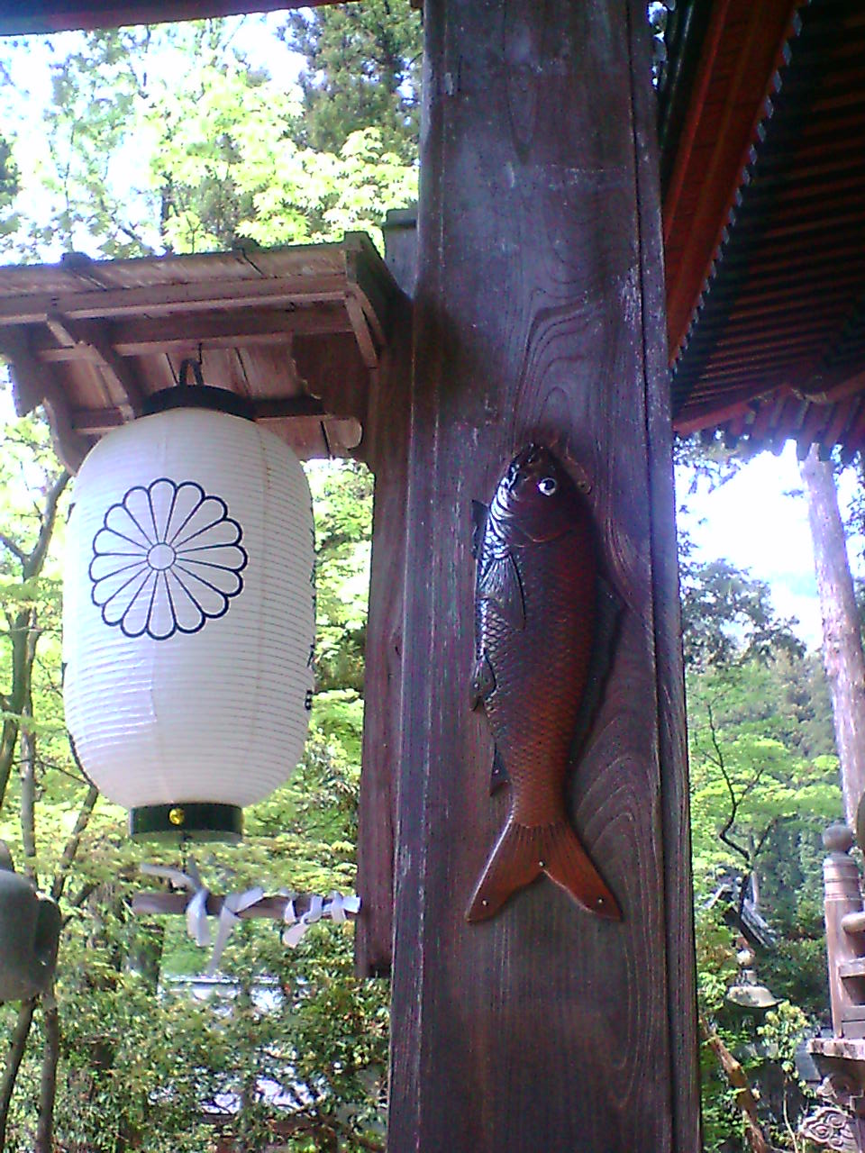 谷汲山華厳寺